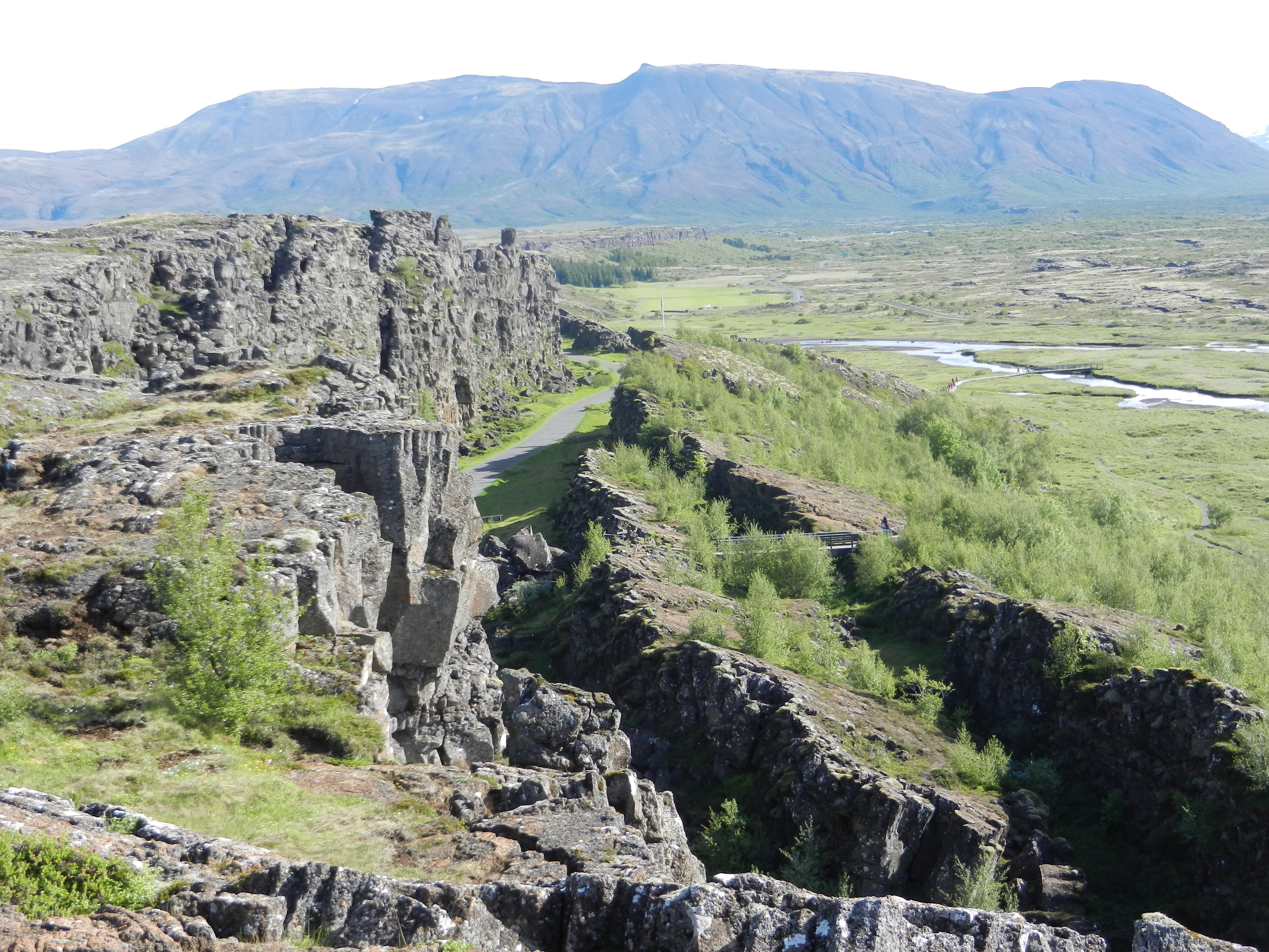 Þingvellir, pojav razmikanja tektonskih plošč, Islandija.